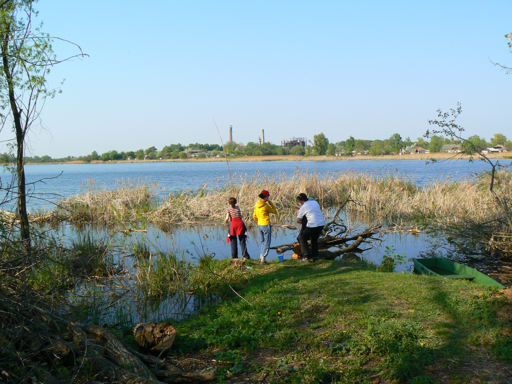 Супій у Новому Бикові: Водойма Супій у Новому Бикові